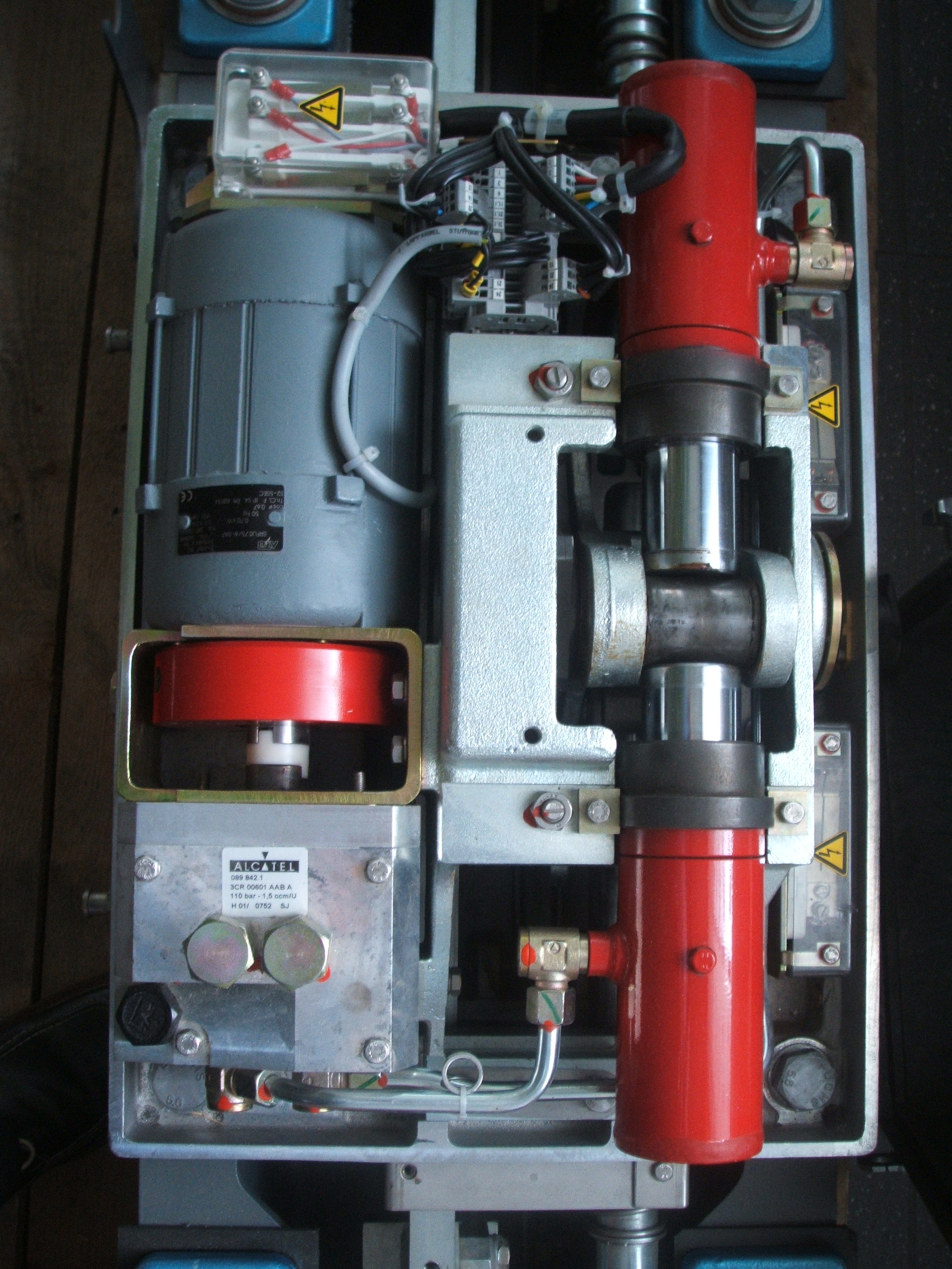 elektrohydraulischer ALCATEL-Weichenantrieb L826H